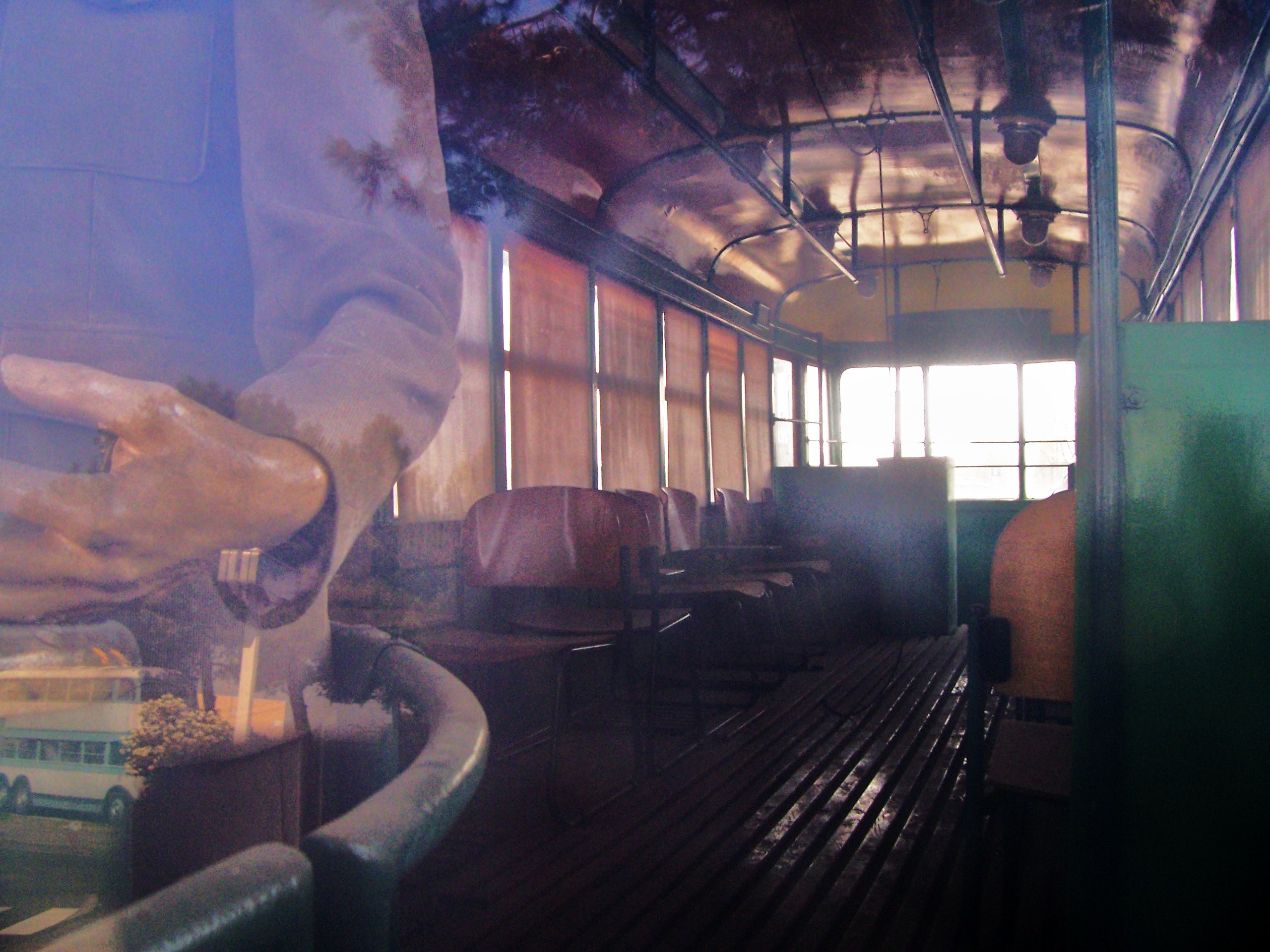 Interior de un tranvía antiguo de zaragoza